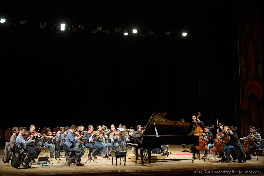 Репетиция оркестра "Виртуозы Москвы" Тольятти, 2013